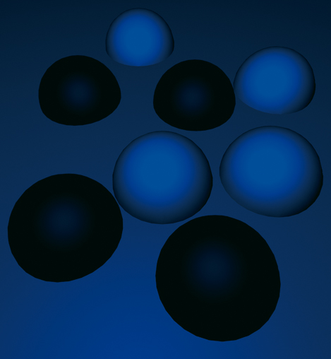 Adibide hauekin ikusten dugu nola argiaren koloreak objektuen koloreen perzepzioa aldatzen du. Horregaitik ondorioztatzen dugu: 1.- Azal zuriek argiaren kolorea hartzen dute zuri koloreak argiaren kolorea aldatzen ez duelako. Argi zuriak ere ez du objektu azaleen kolorea aldatzen. 2.- Argia koloreztatuak kolore bereko azal baten gainean ez du objektuaren kolorea aldatzen. 3.- Azal batean beltza ikusiko dugu baldin eta jotzen duen argiak badu hain zuzen ere azal horrek errebotatzen ez duen argi espektroren zatia (kolorea). Argi horiaren irudian, kasu, beltza bada bola urdina horrek espektro osoa hartzen du urdina izan ezik. 4.- Azal batean ikusten dugun kolorea nahasketa kengarria da non argiaren argi espektroari azalak hartzen duen espektro horren zatia kentzen diogun.